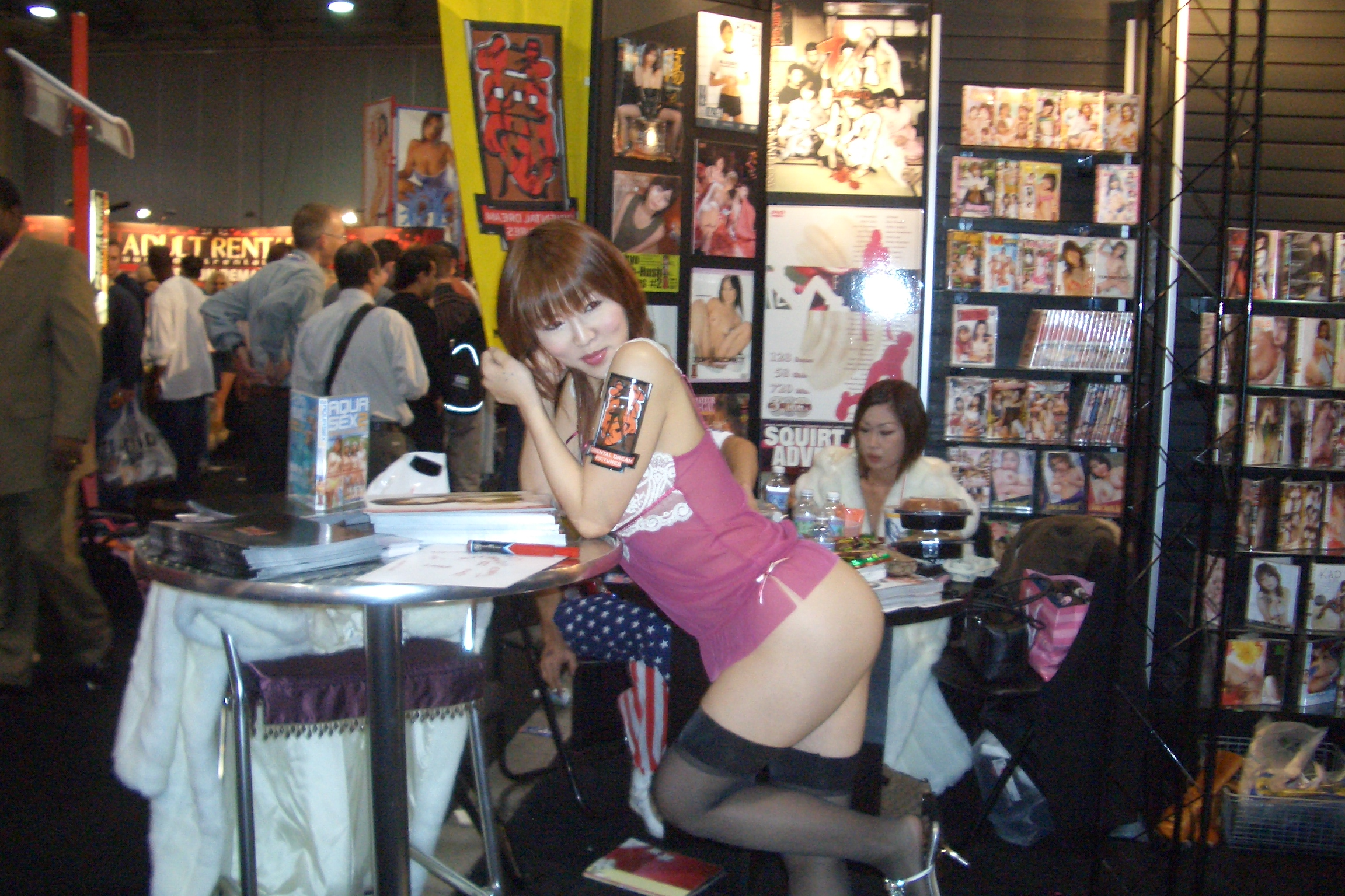 CIMG0677